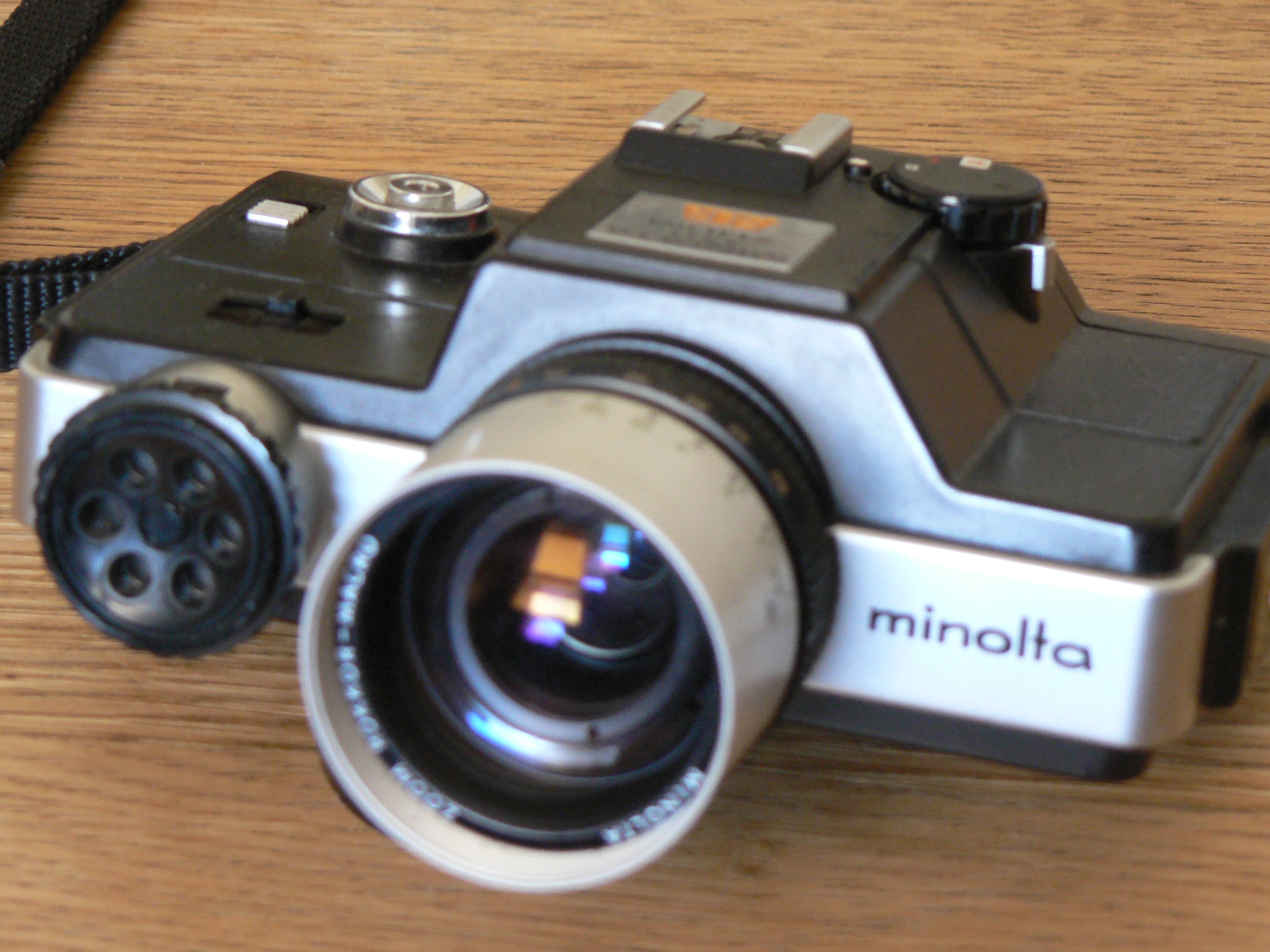 Minolta 110 Zoom SLR